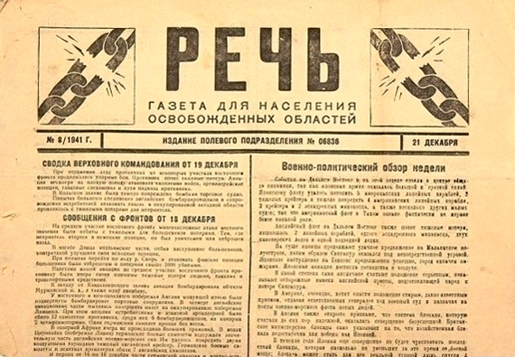 Газета «Речь» - многотиражная оккупационная немецкая газета, выходившая в Орле. По тематике схожа с газетами «Новый путь» и «За родину».